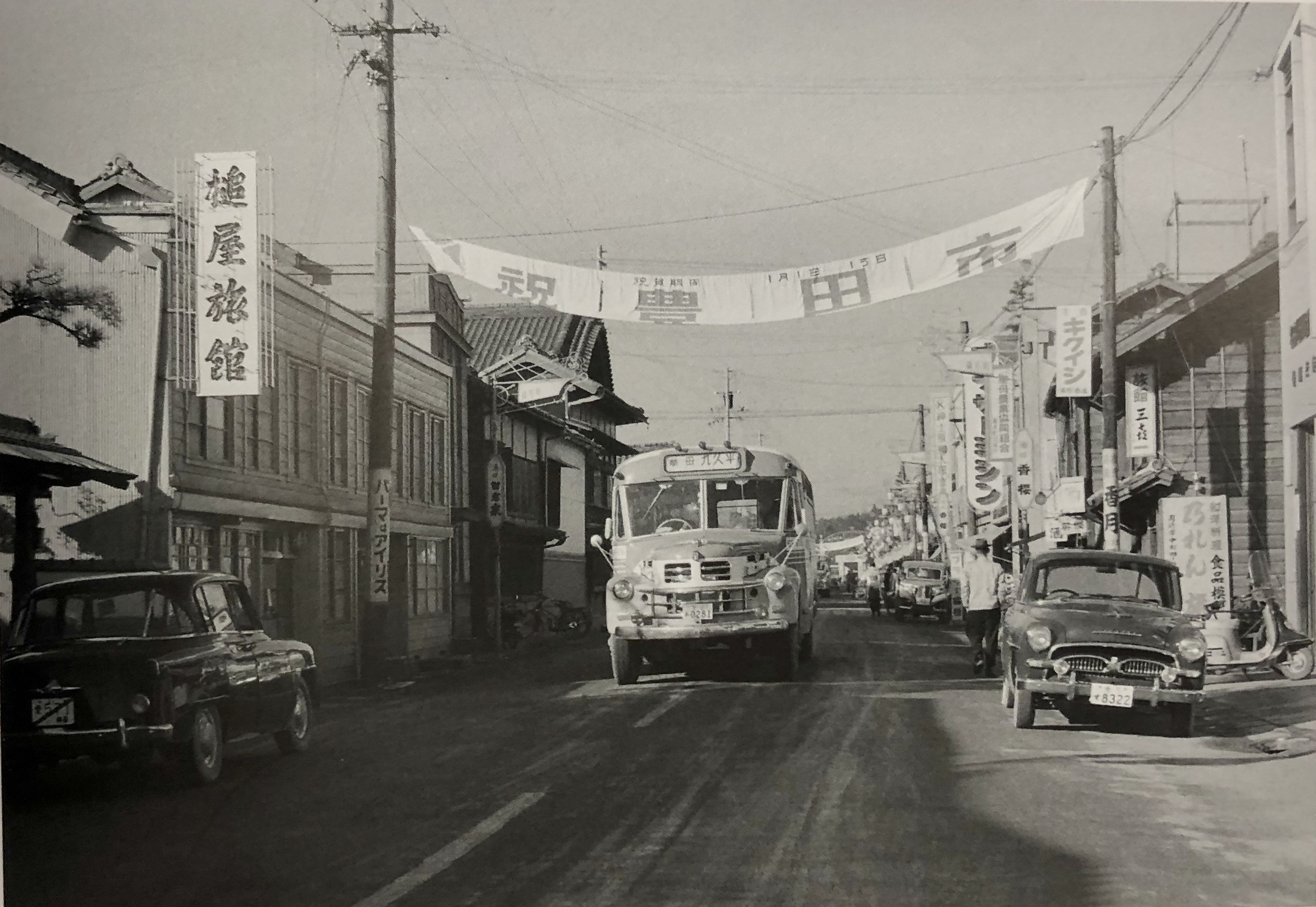 「挙母市」から「豊田市」への市名変更を祝う横断幕。1959年1月撮影。